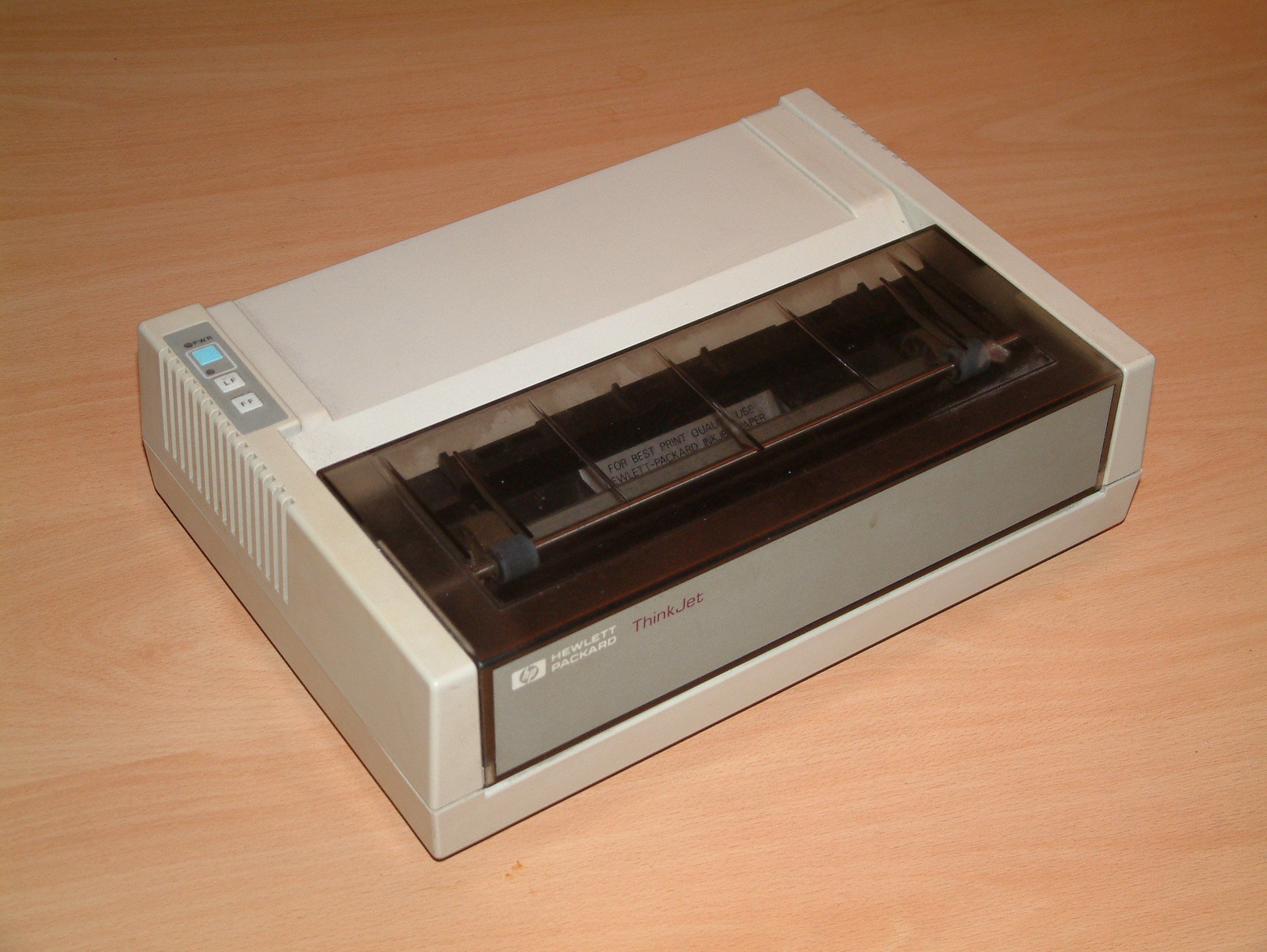 Hewlewtt Packard ThinkJet, 1984